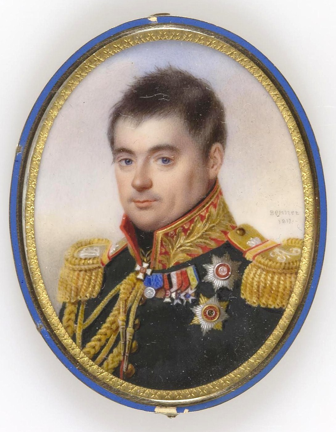 Князь Пётр Михайлович Волконский (1776-1852)